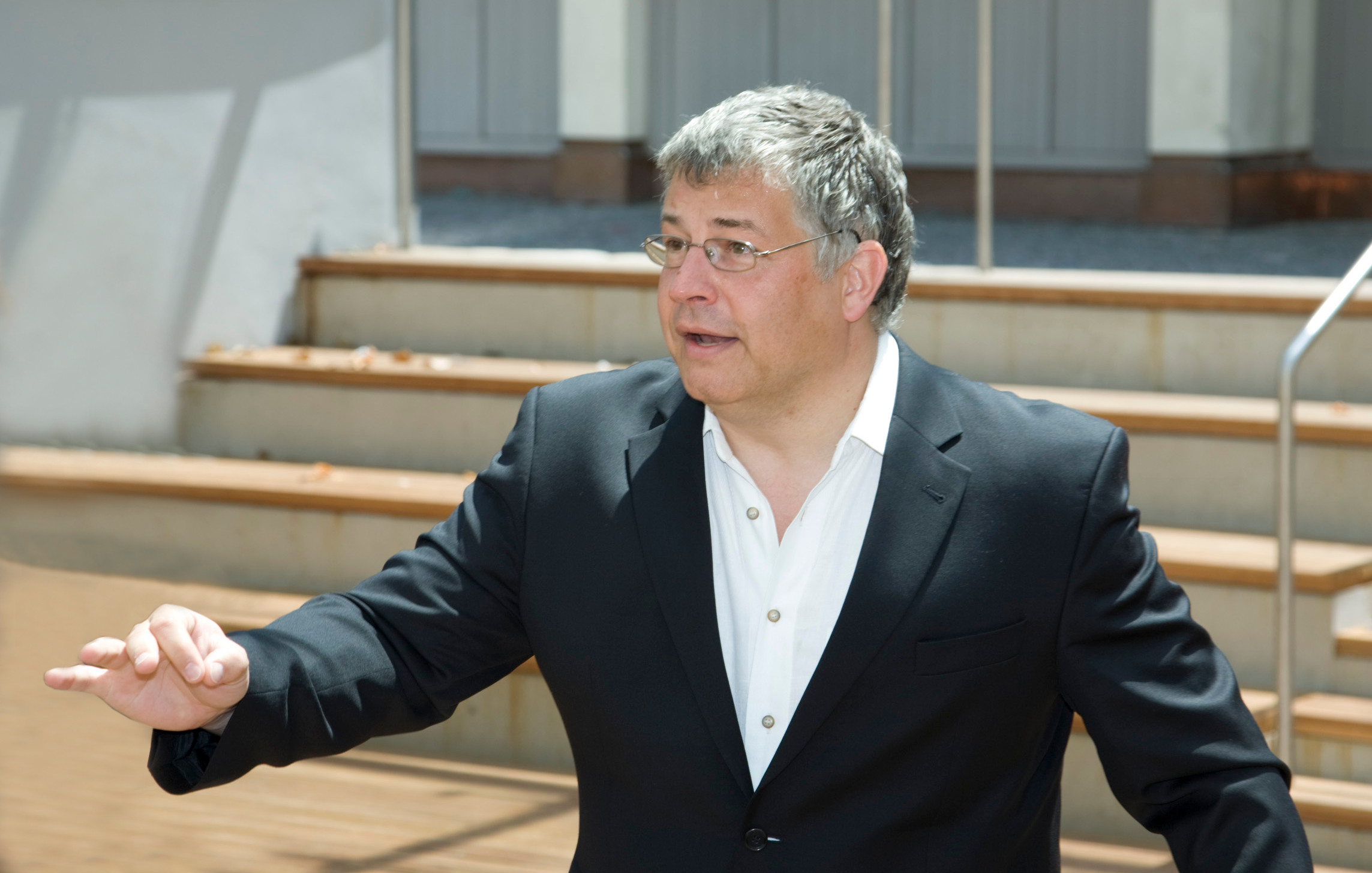 Bernhard Sieberer, Probenaufnahme